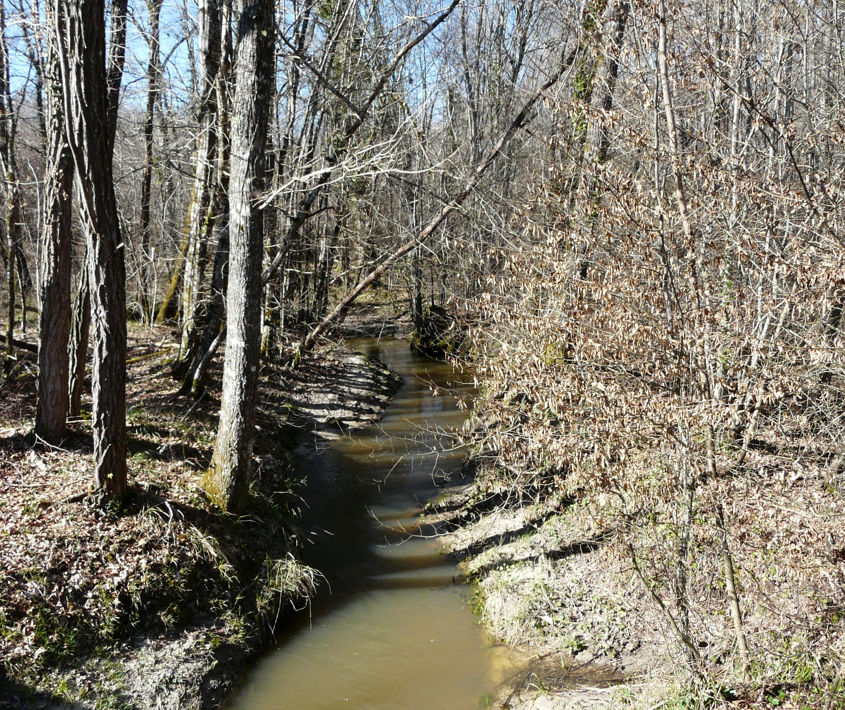 La Petite Duche en amont du pont de la route départementale 41, en limites d'Eygurande-et-Gardedeuil (à gauche) et de Servanches (à droite), Dordogne, France.